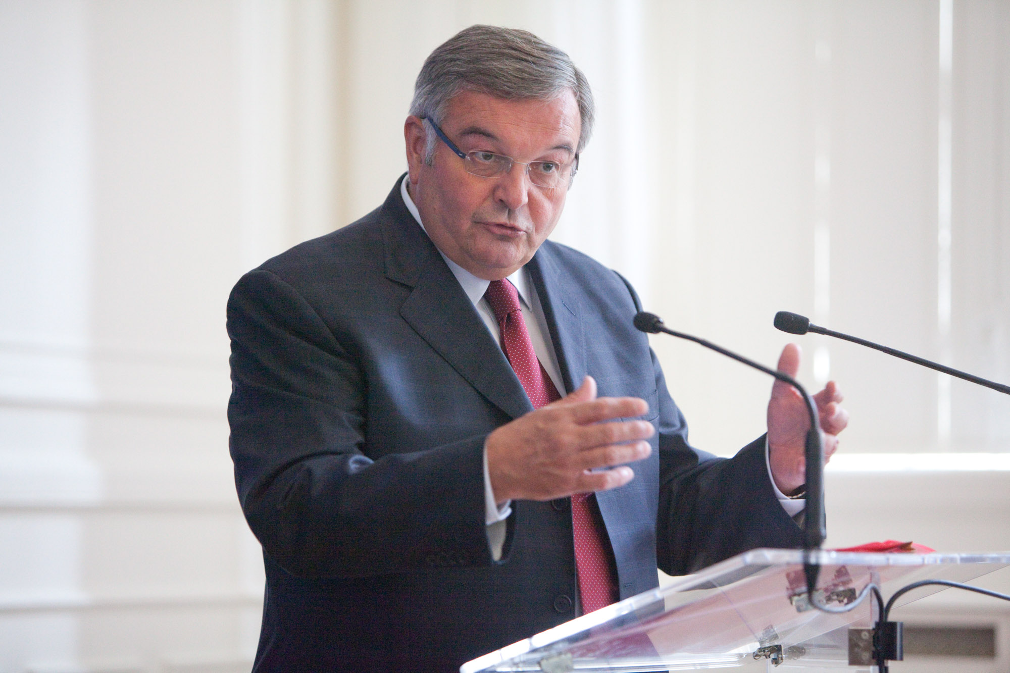 Michel Mercier - Point presse de présentation du séminaire organisé le 10 septembre 2009 à la demande de François Fillon : Numérique : investir aujourd'hui pour la croissance de demain.